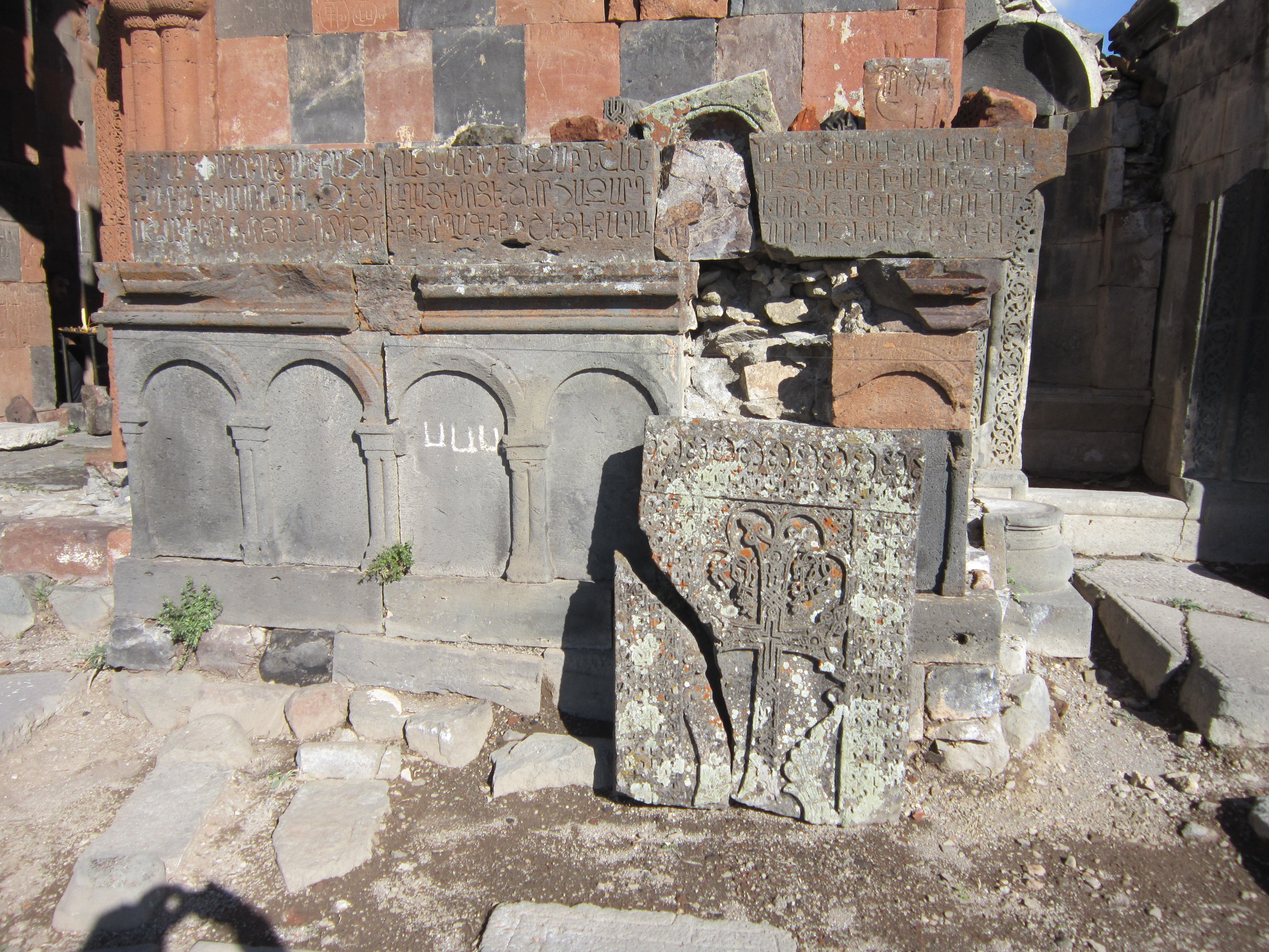 Խաչքար Հավուց Թառի վանքում 99.4/3.1.1.1